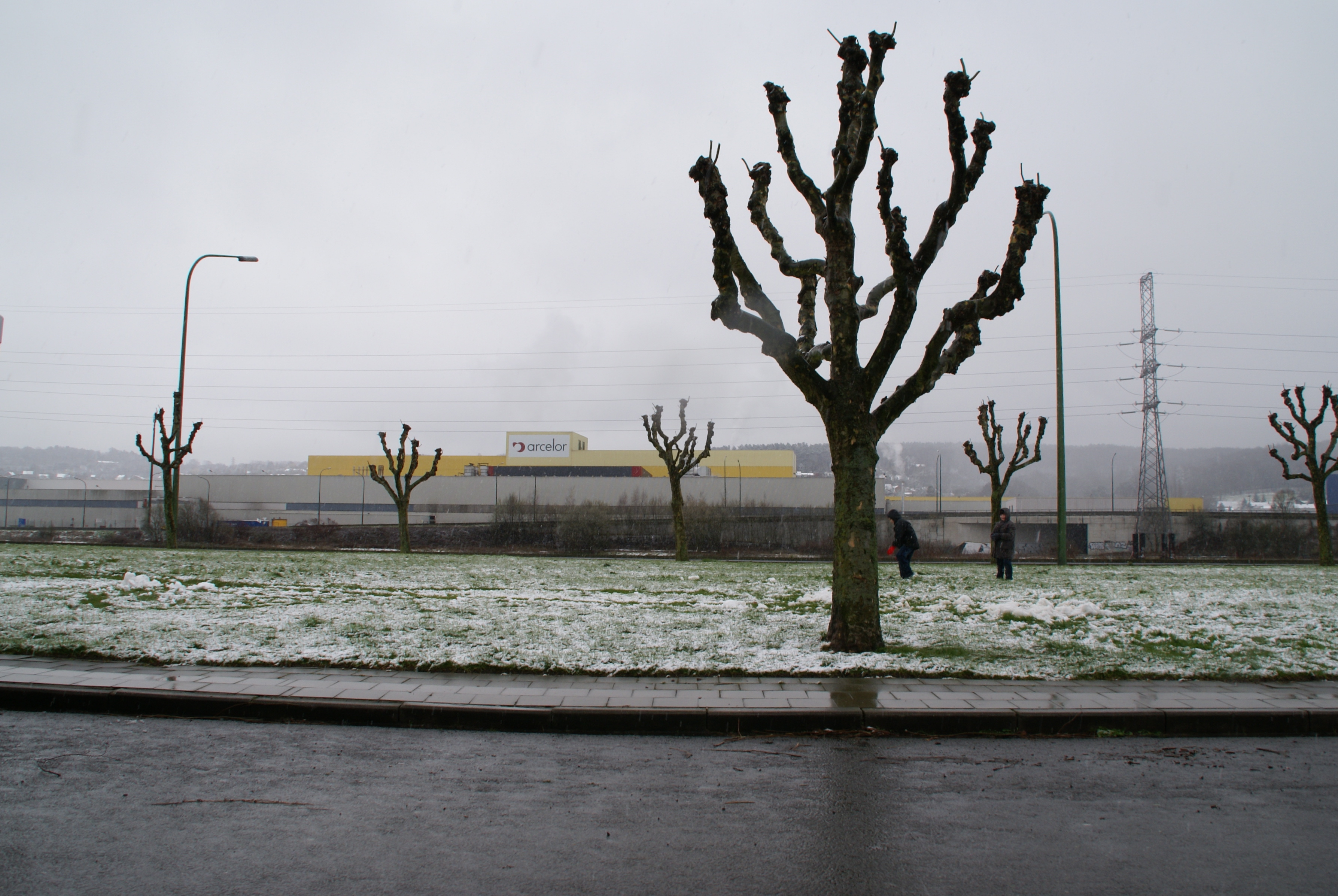 Chokier & Ivos-Ramet (Belgium) The Arcelor factory seen from the village green of Chokier L'usine Arcelor d'Ivoz-Ramet, vue du pré public de Chokier Fàbrica d'Arcelor d'Ivoz-Ramet vist del prat públic de Chokier De Arcelorfabriek van Ivoz-Ramet, gezien van Chokier